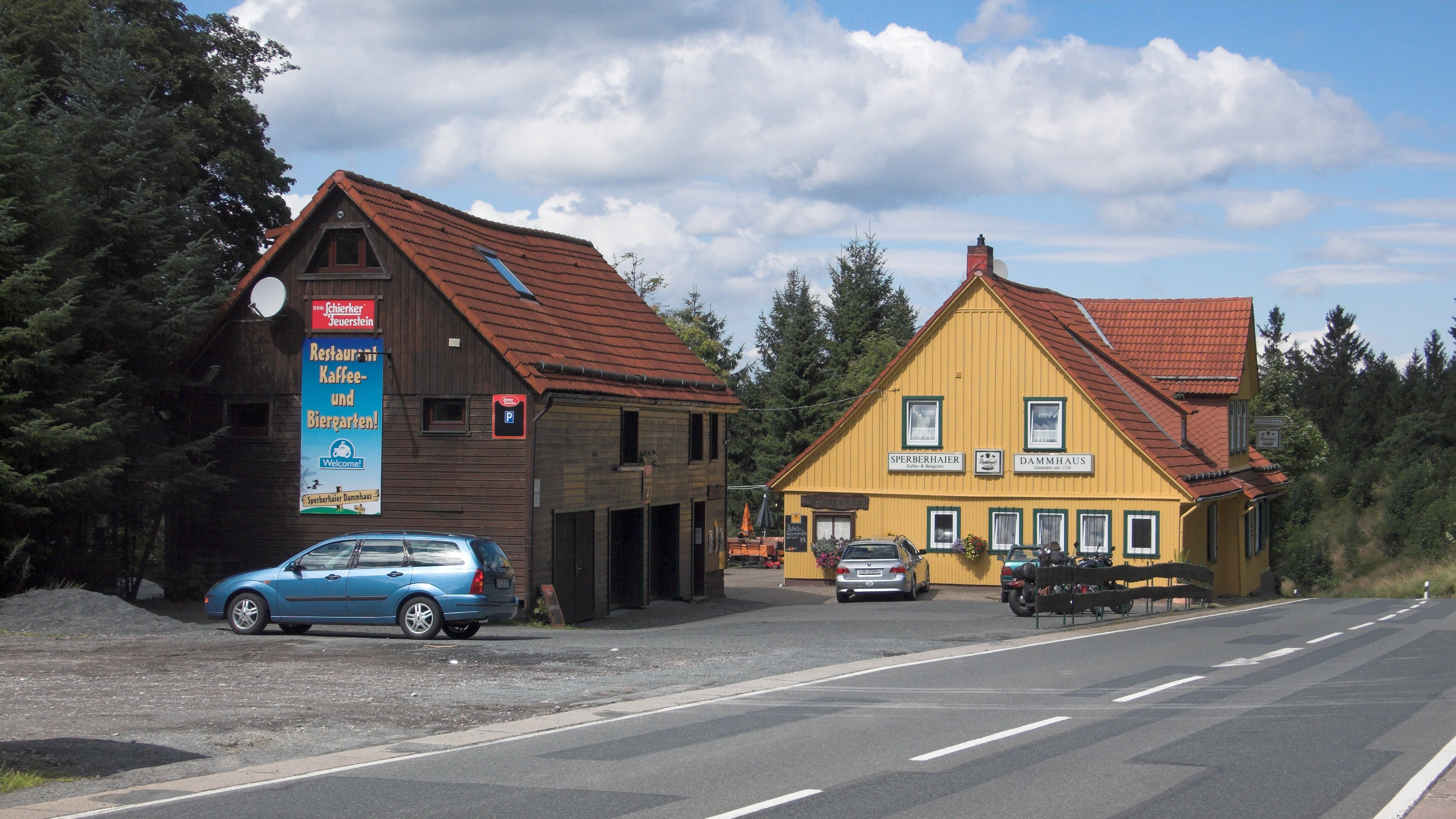 Ostseite des Sperberhaier Dammhauses mit neuen Anstrich in 2008